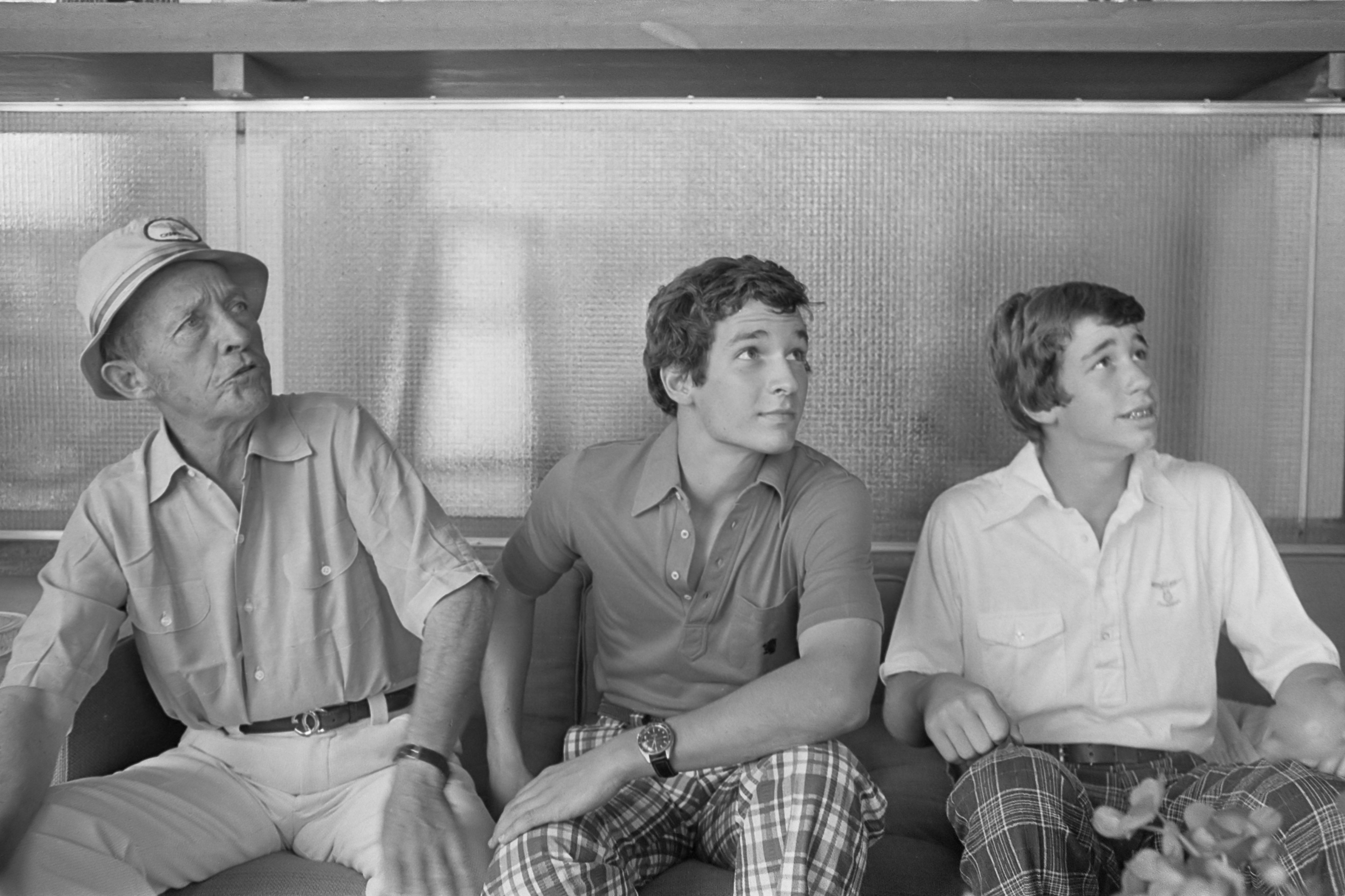 Bing Crosby en Pieter van Vollenhoven op het American Express Pro-Am golftoernooi 1975. Bing Crosby met zijn zoons Harry (m) en Nathan 6 augustus 1975